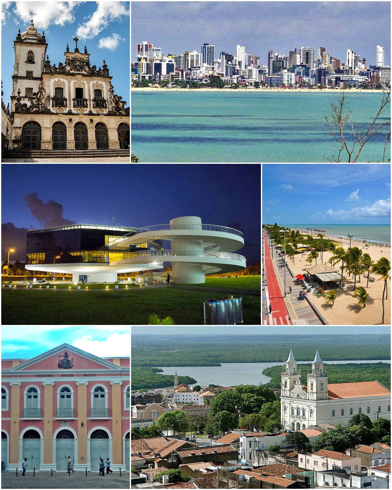 Montagem de fotos - João Pessoa, Paraíba, Brasil